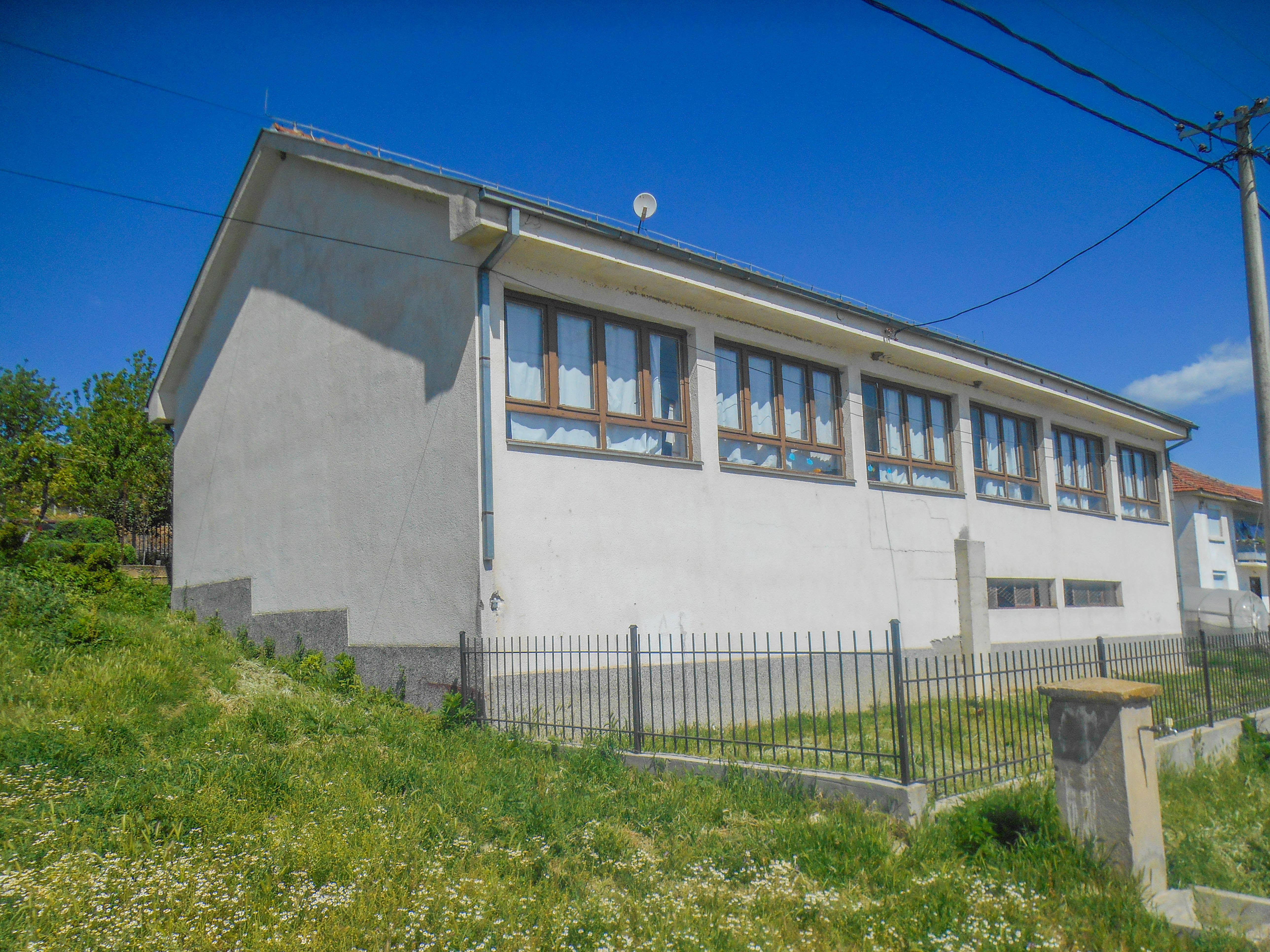 Основно училиште „Гоце Делчев“ - Седларци